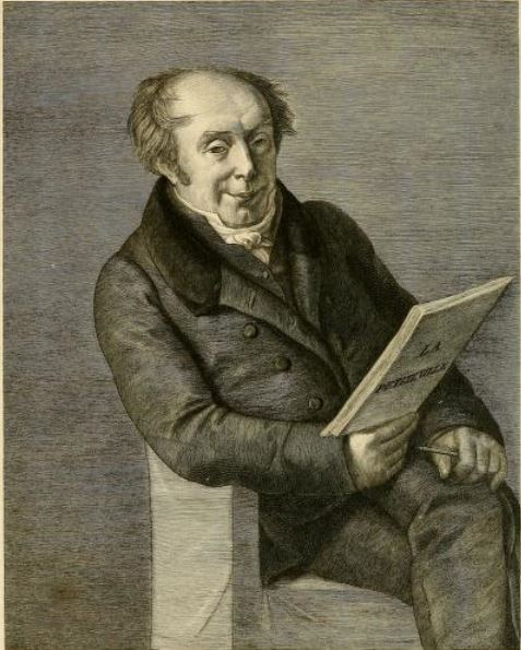 Portrait gravé d’un sujet assis de trois-quarts droit, regardant de face et tenant de la main gauche un crayon, de la main droite un recueil intitulé : La Petite Ville